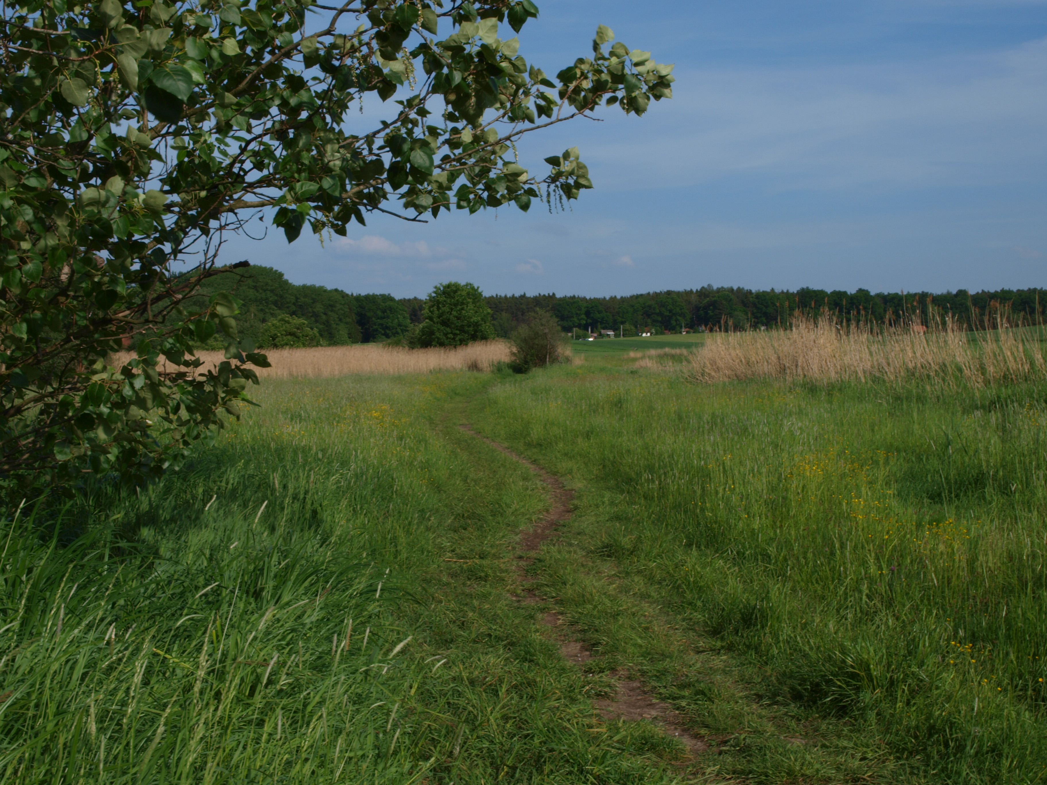 Vlhké louky PP Roudnička a Datlík, v sousedství intravilánu Roudničky, květen 2011.